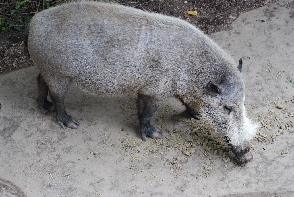 Wild Boar at San Diego Zoo